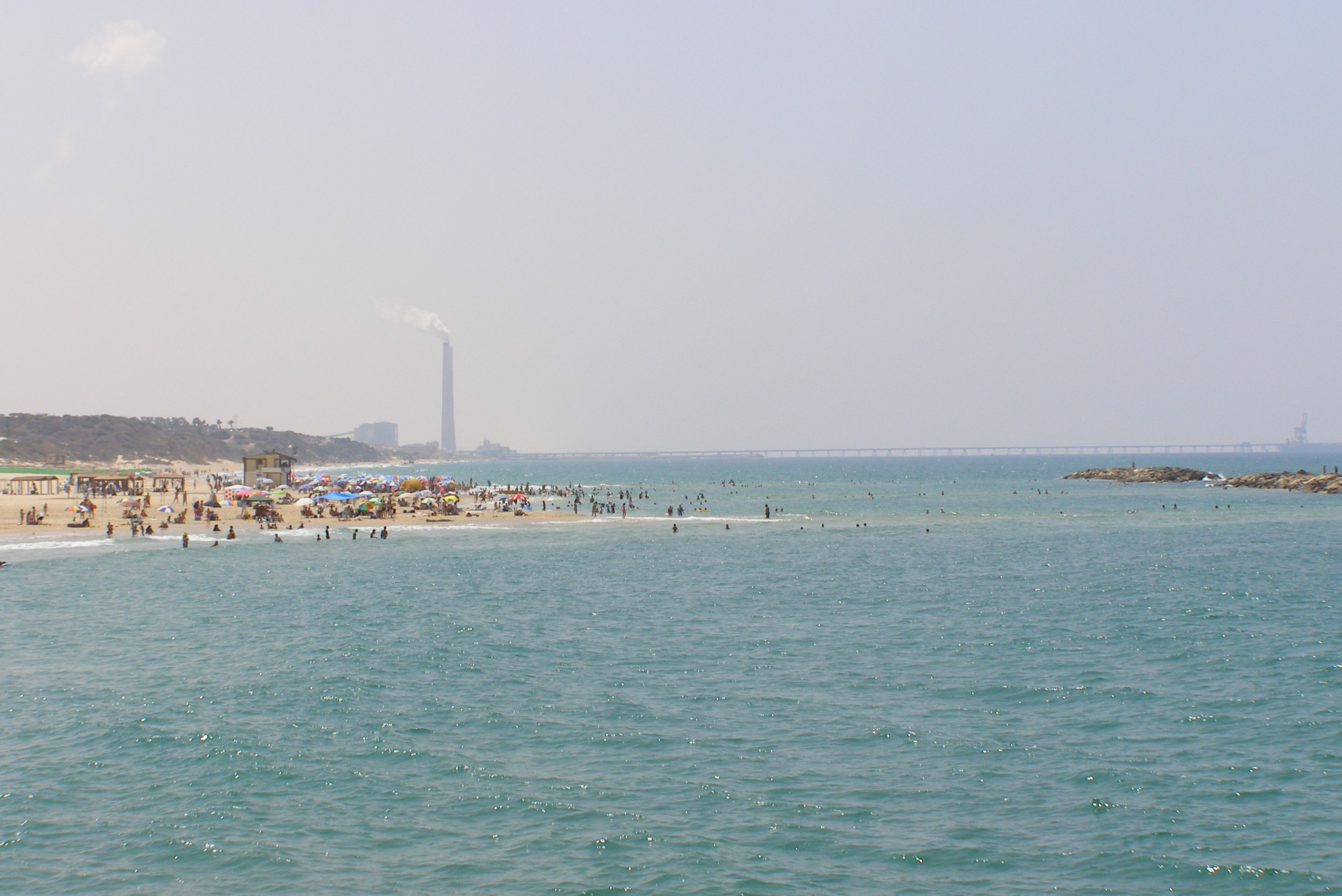 Askelon Beach